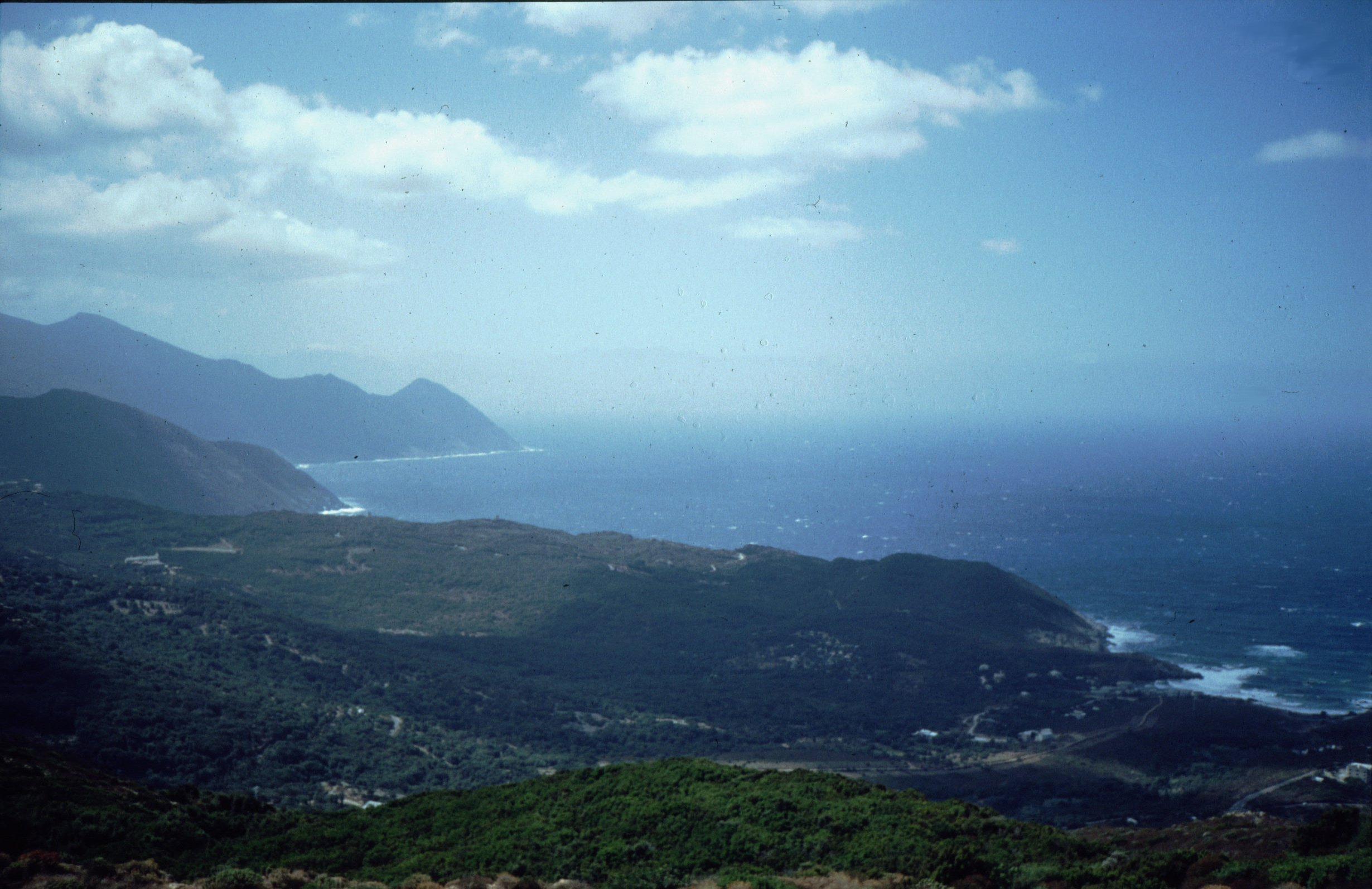 Bild-Beschreibung Beschreibung: Cpa Corse Westküste - Blick nach Süden Quelle: Selbstfotografiert Fotograf oder Zeichner: Birgit Lachner Andere Versionen: - Lizenzstatus: GNU FDL